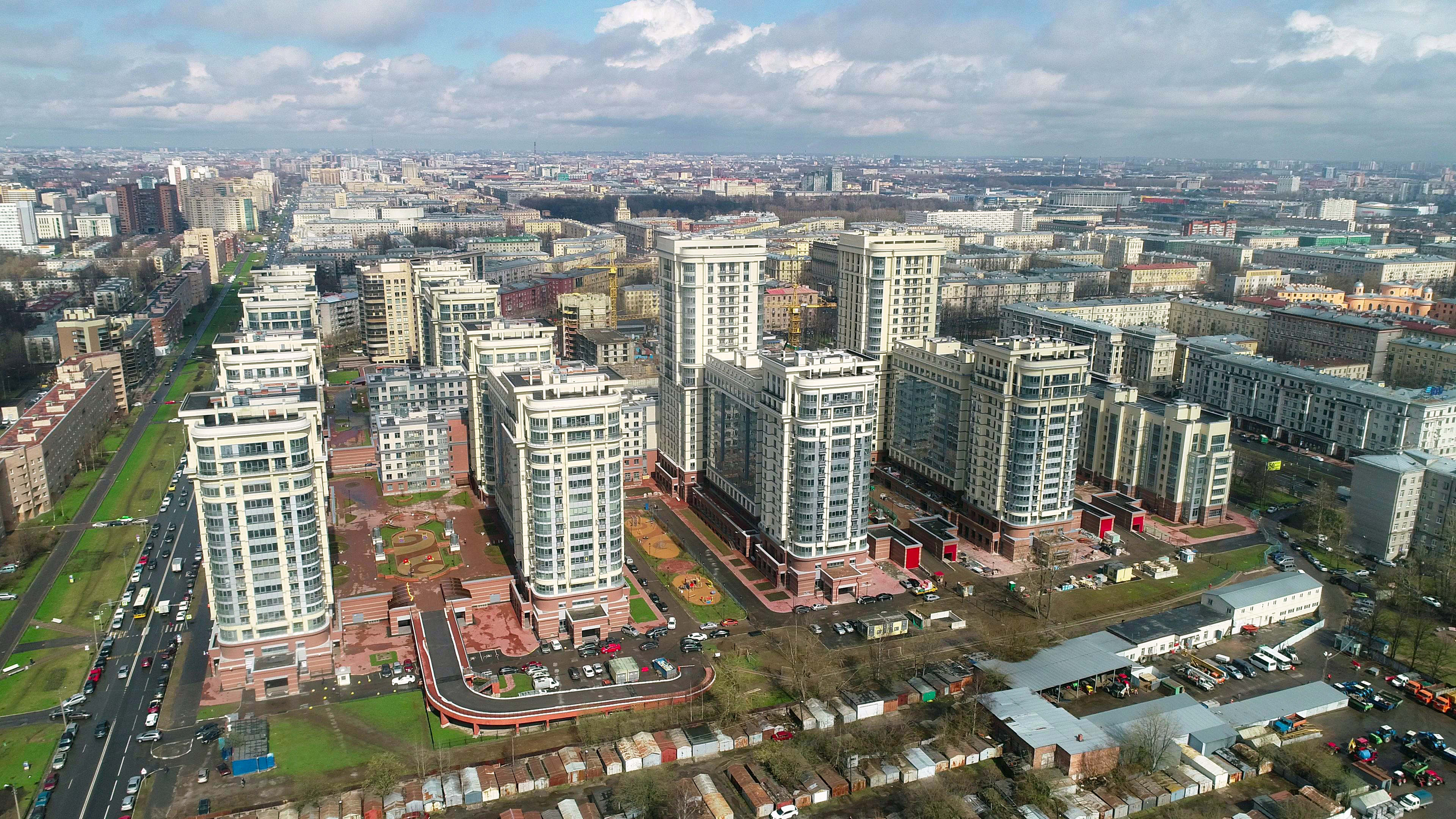 Жилой комплекс "Граф Орлов" на Московском проспекте